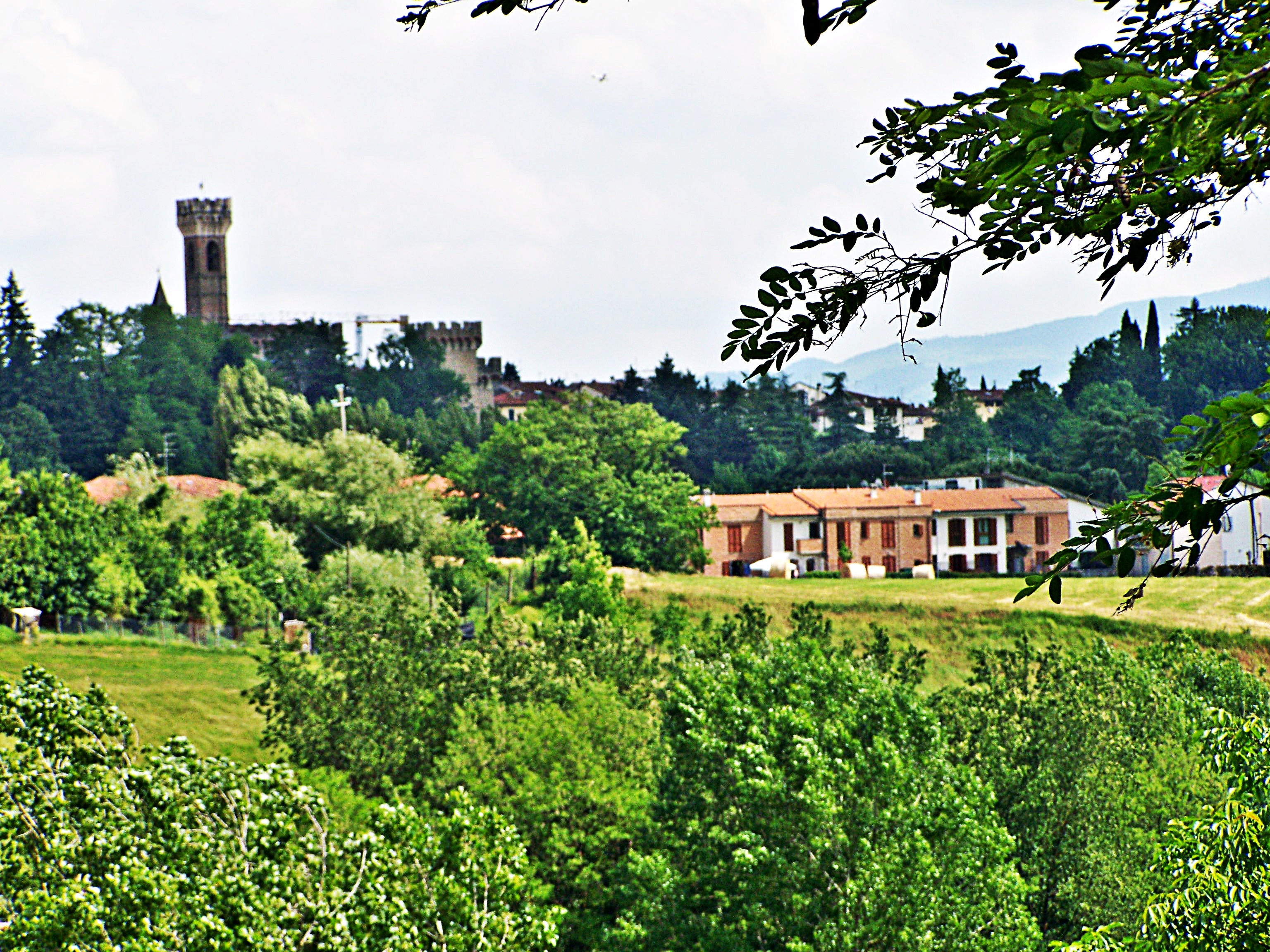 Scarperia